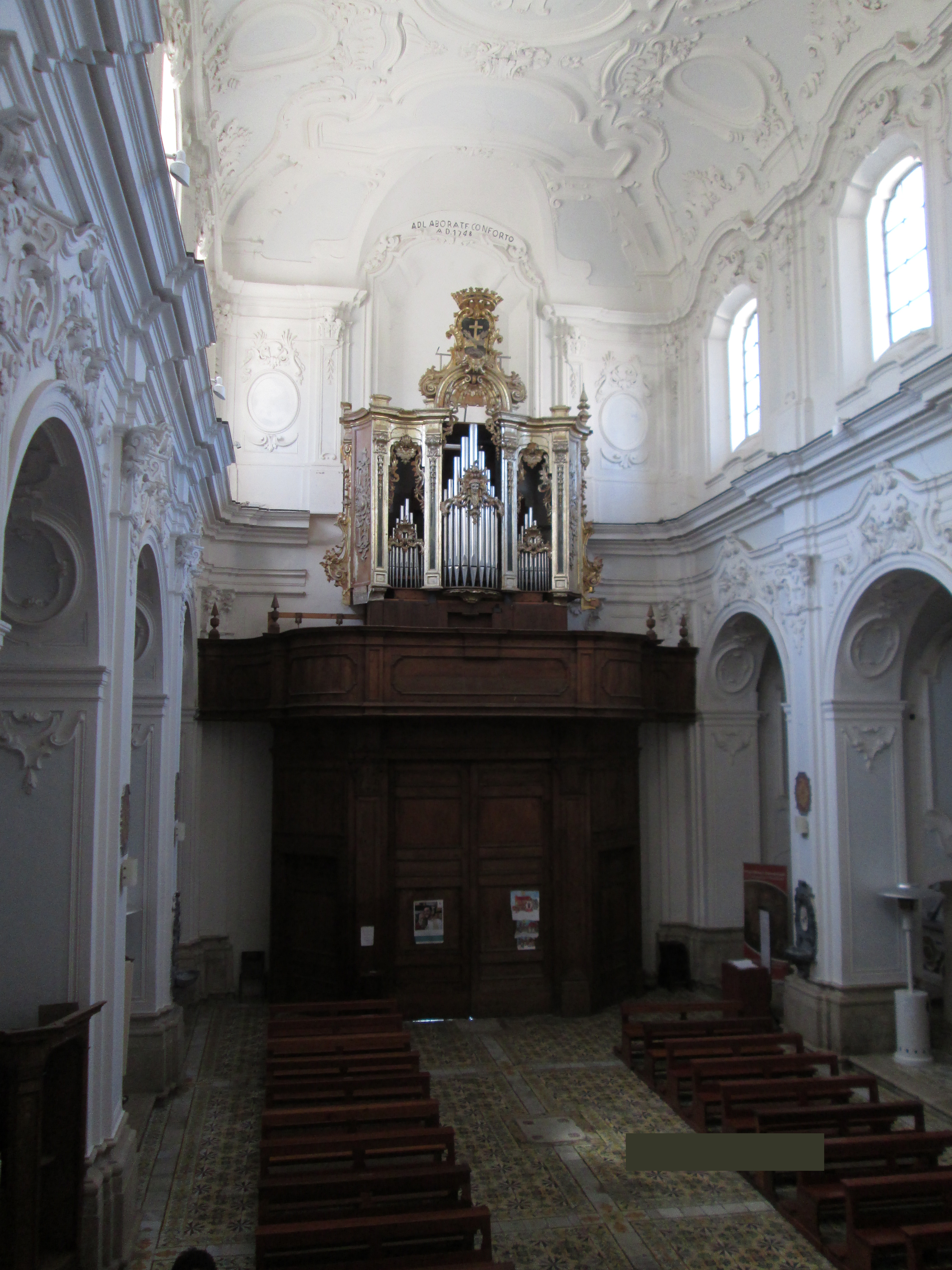 Organo della Chiesa di San Francesco a Folloni (Montella)